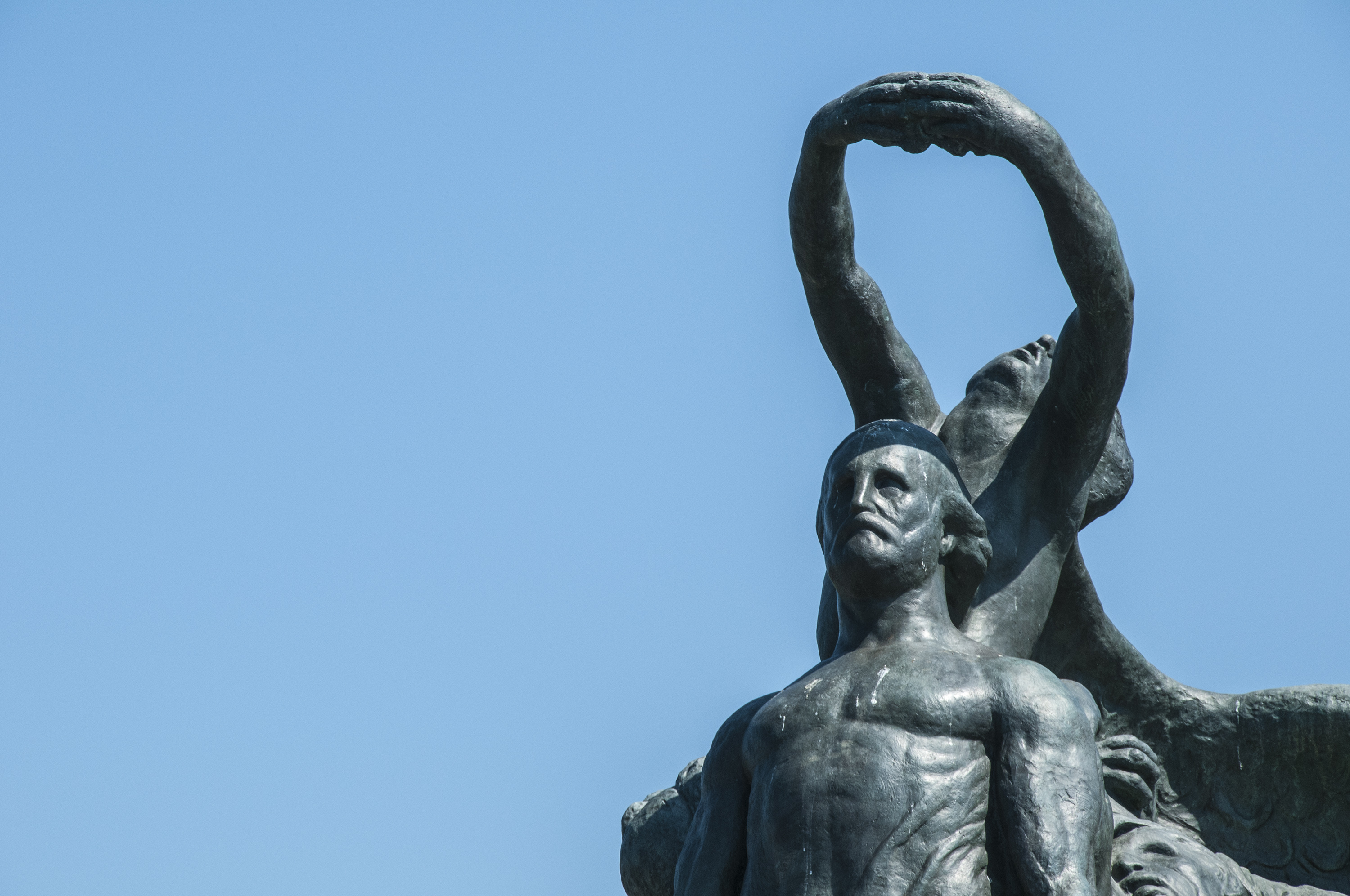 Monumento ai Mille This is a photo of a monument which is part of cultural heritage of Italy.